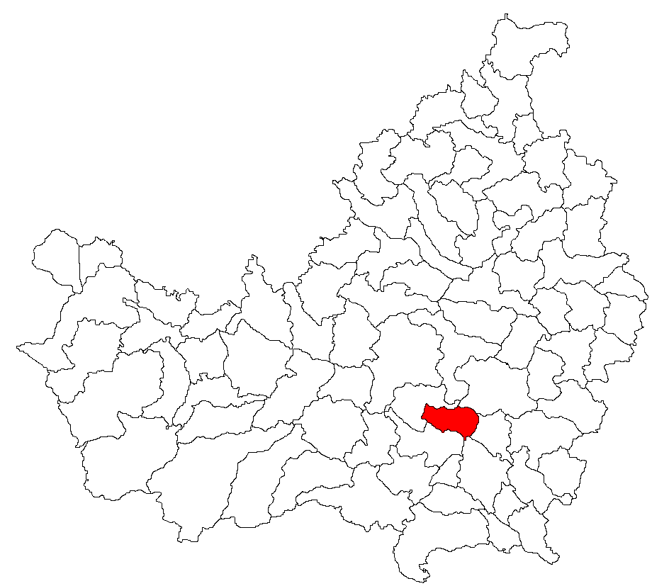 Comuna Aiton, Cluj